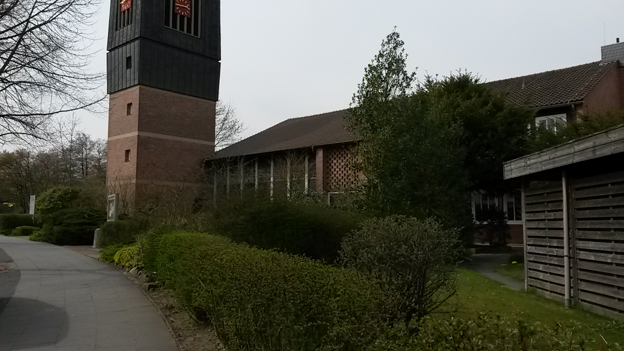 Kirche von der Seite betrachtet